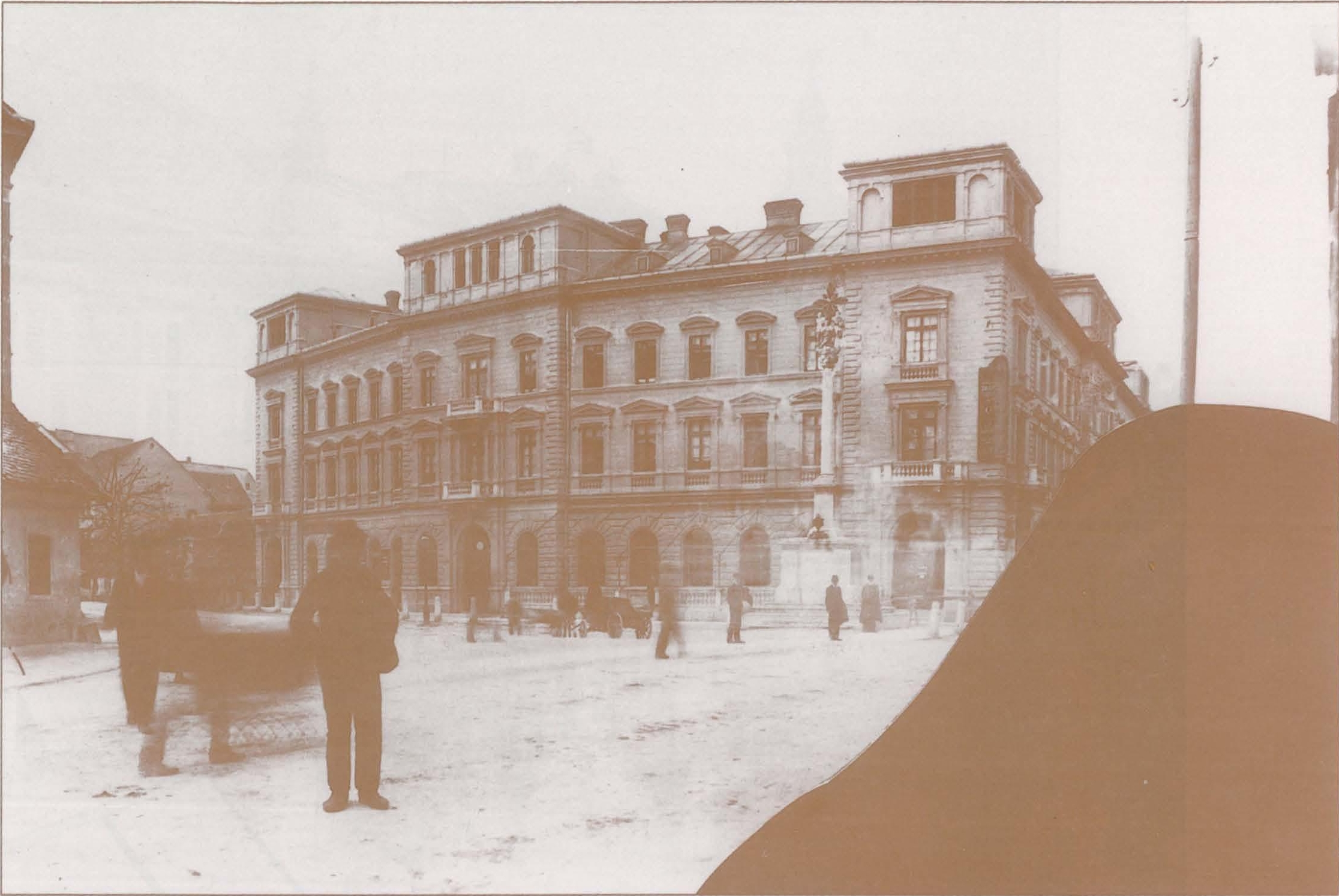 Kavarna Evropa